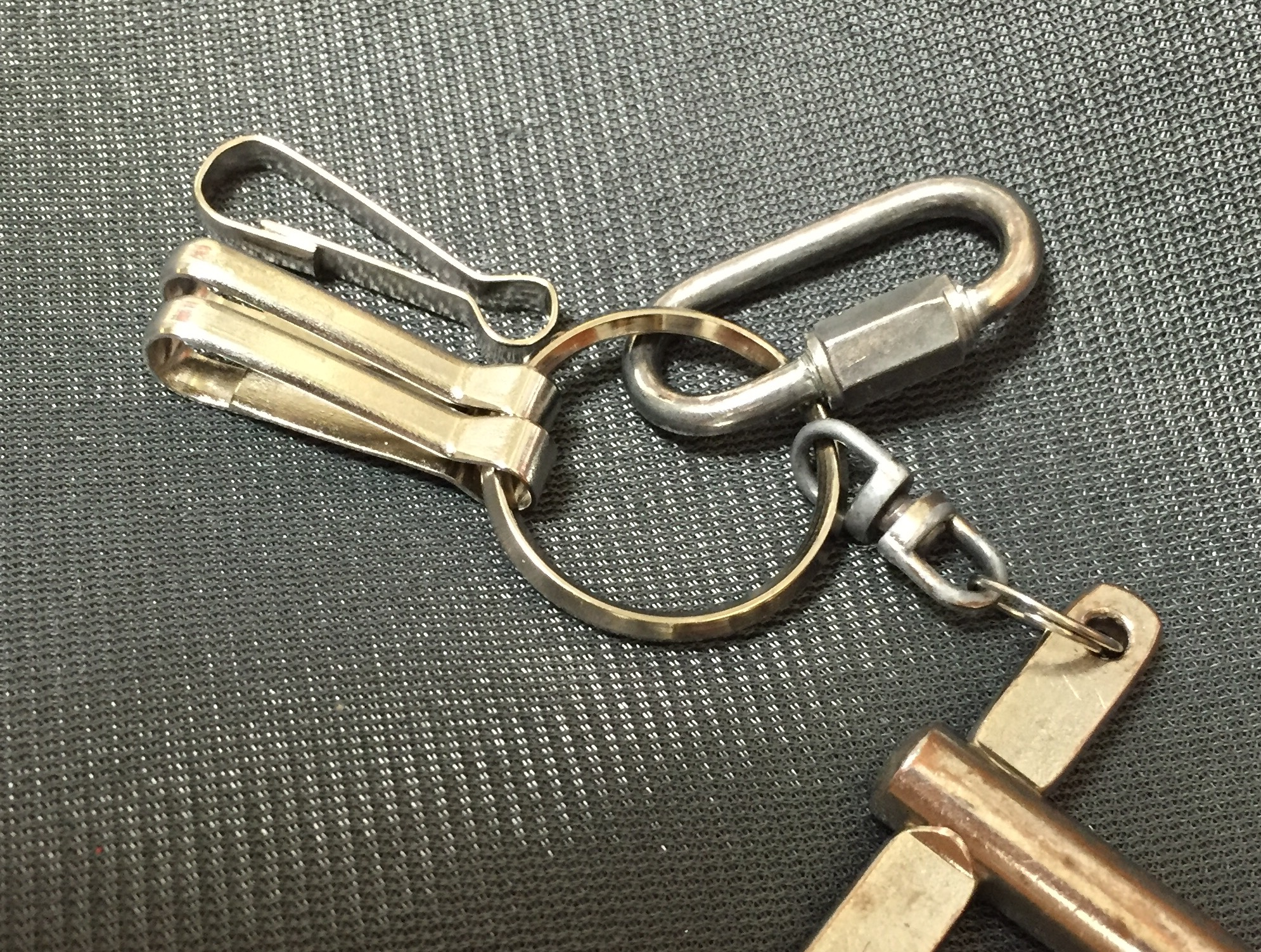 4種類の鐶。